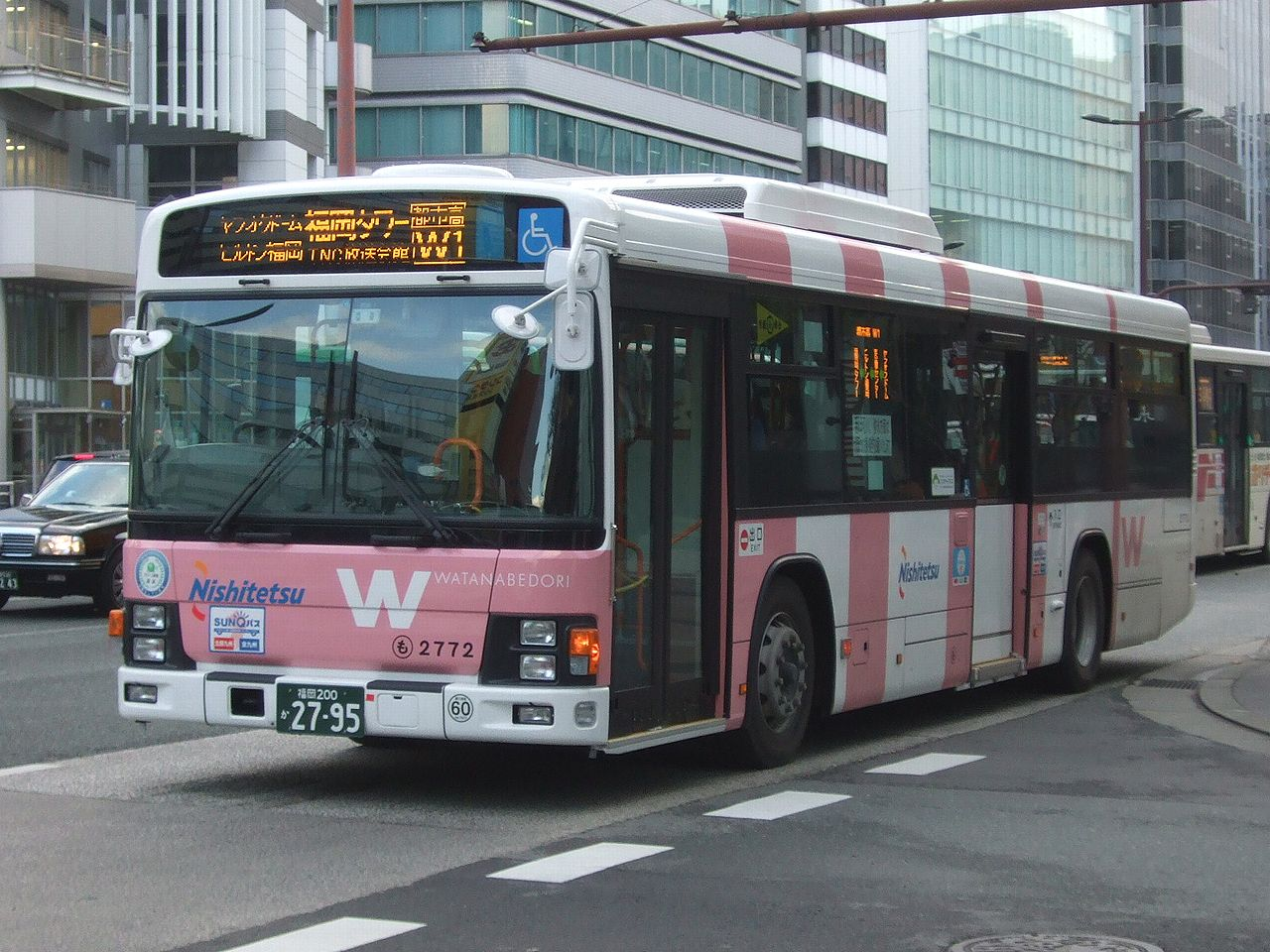 西鉄バス 渡辺通幹線 / Nishitetsu bus Watanabedori Line